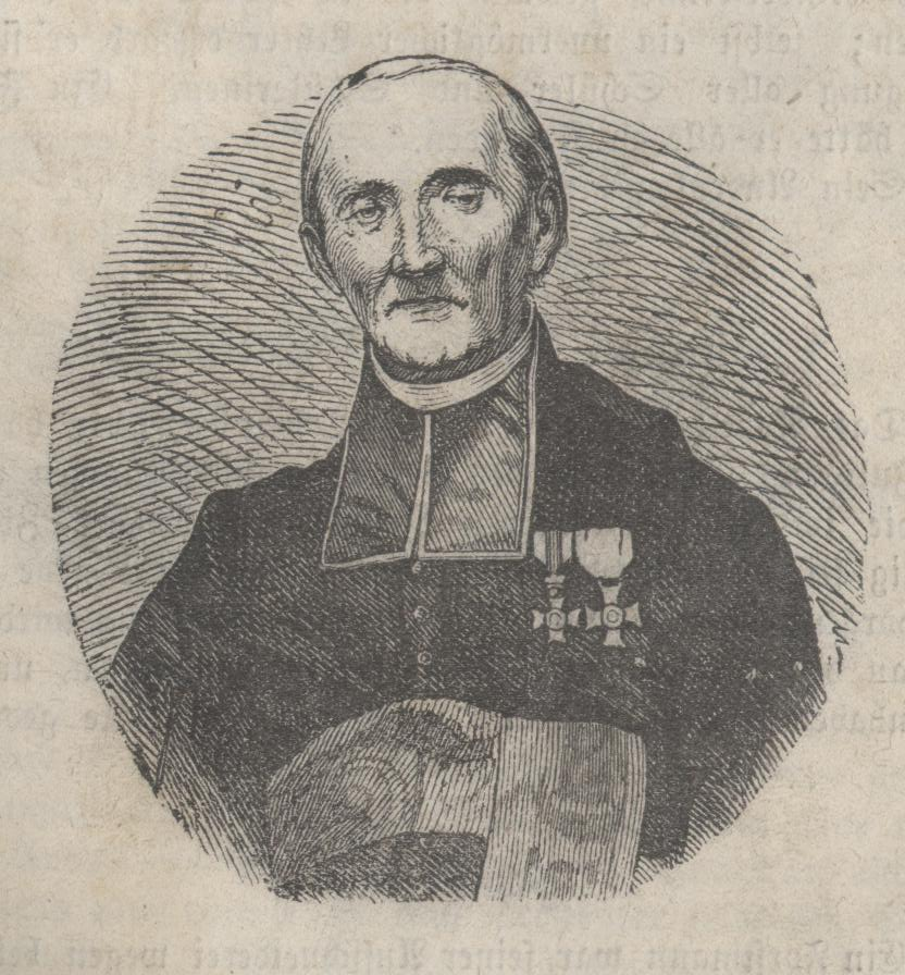 Geistlicher Rat Pfarrer Johann Peter Merz, Mainz